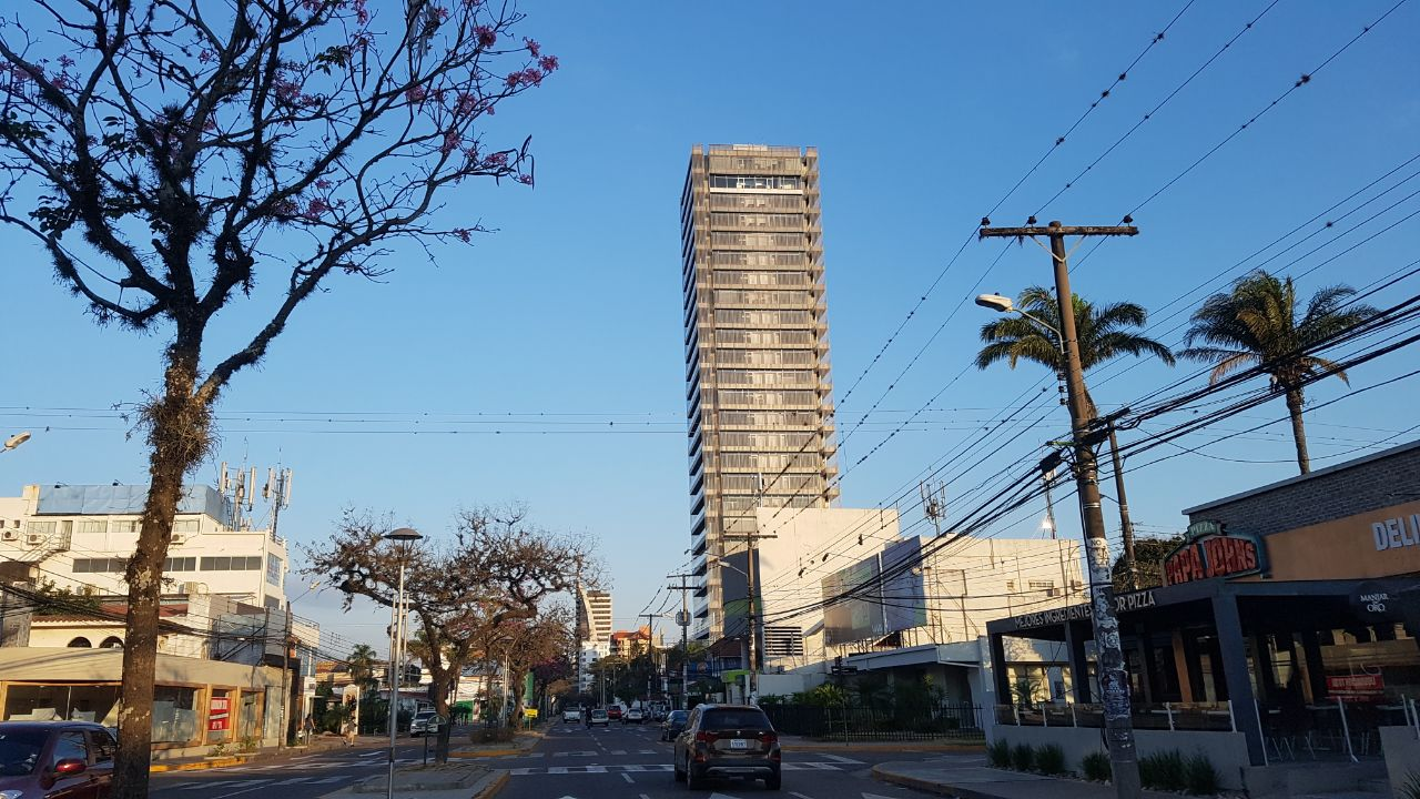 Edificio bajo construccion.